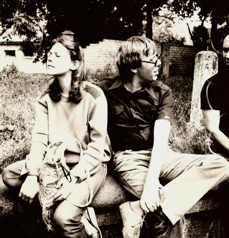 Анна Каменкова и Анатолий Спивак